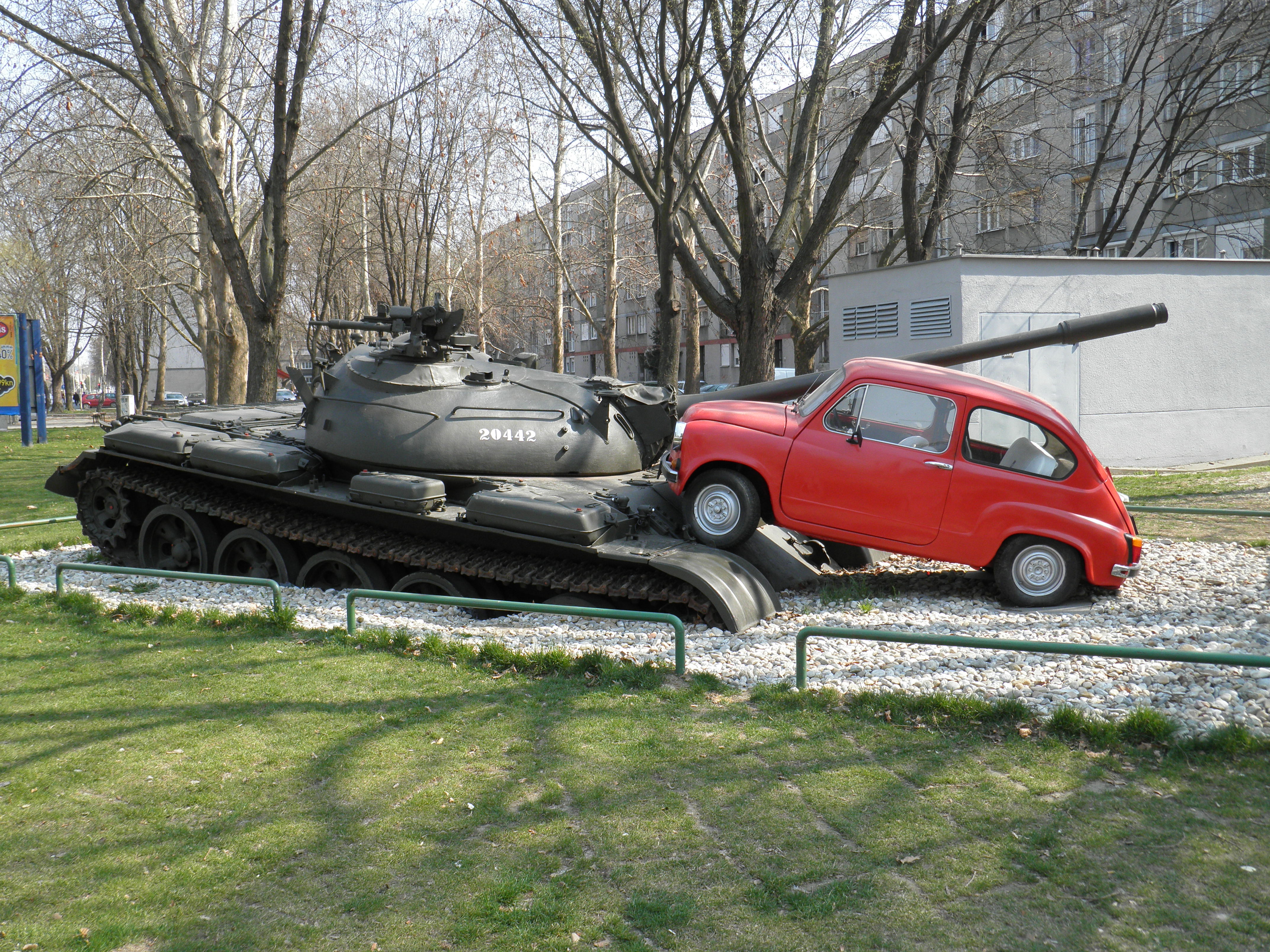 Osijek